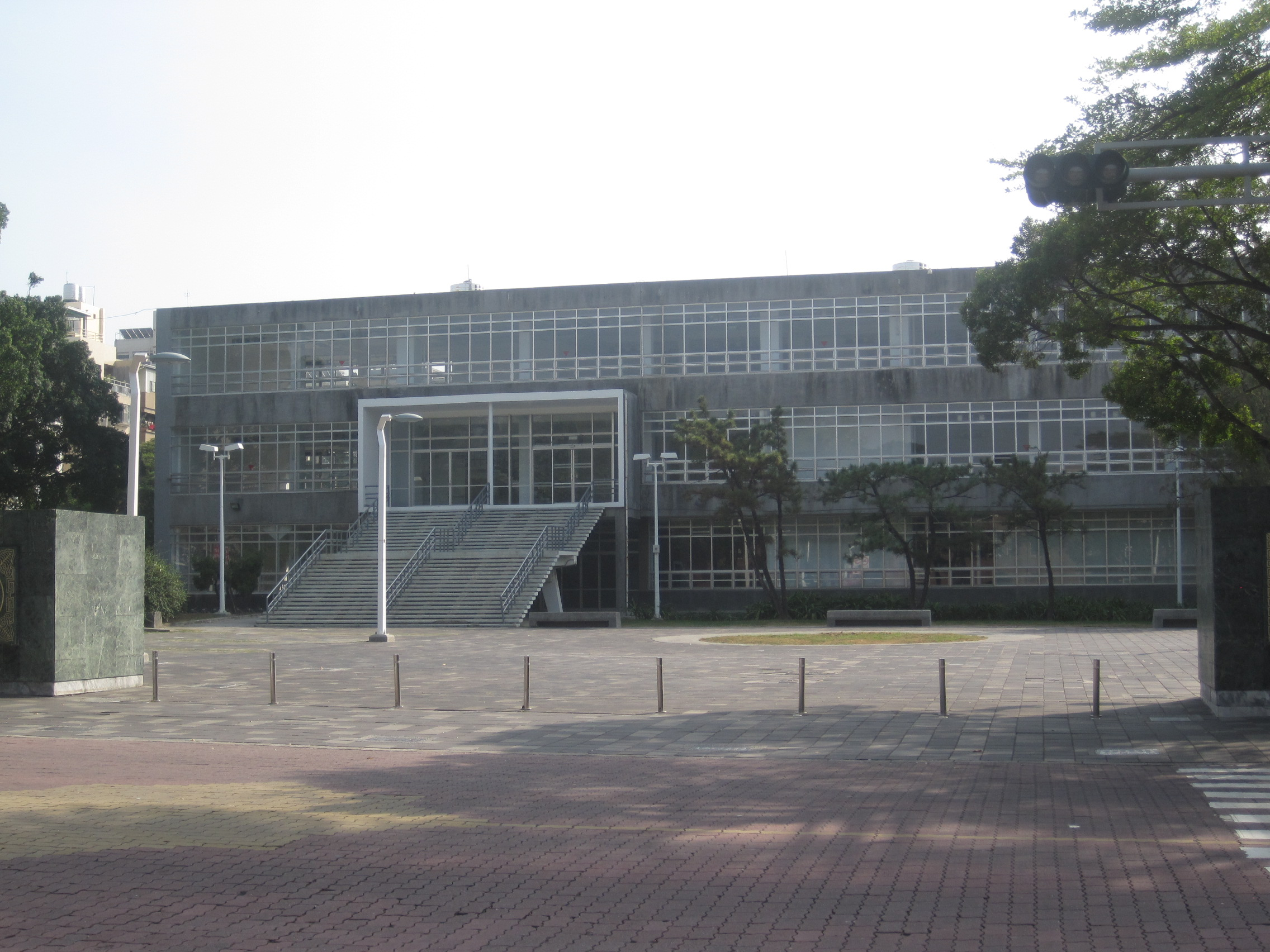 原臺灣省立成功大學圖書館